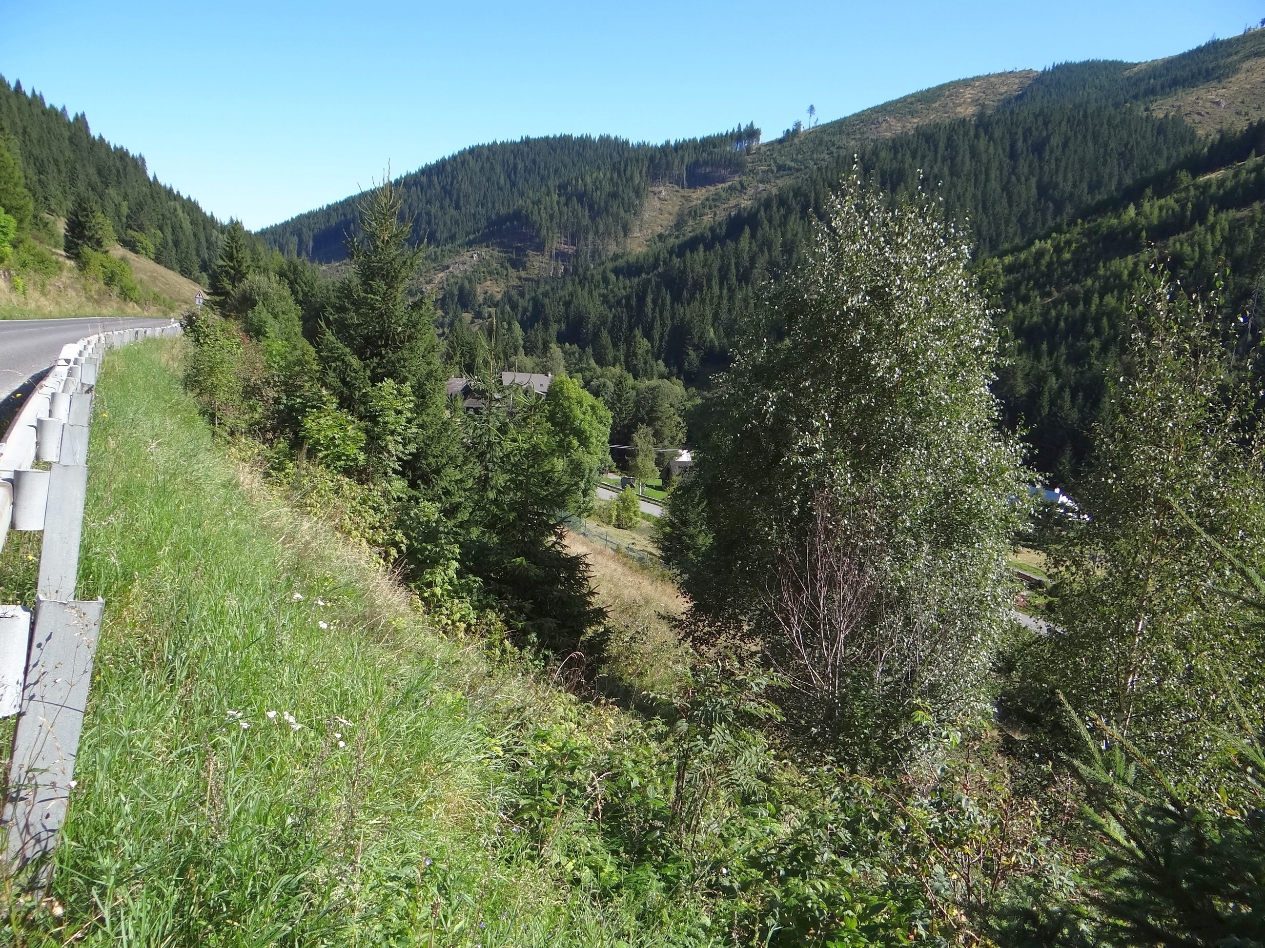 Boicanska dolina